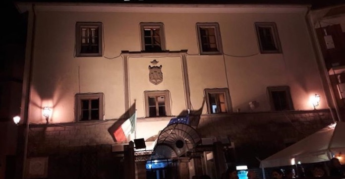 Municipio di Torrice.jpeg